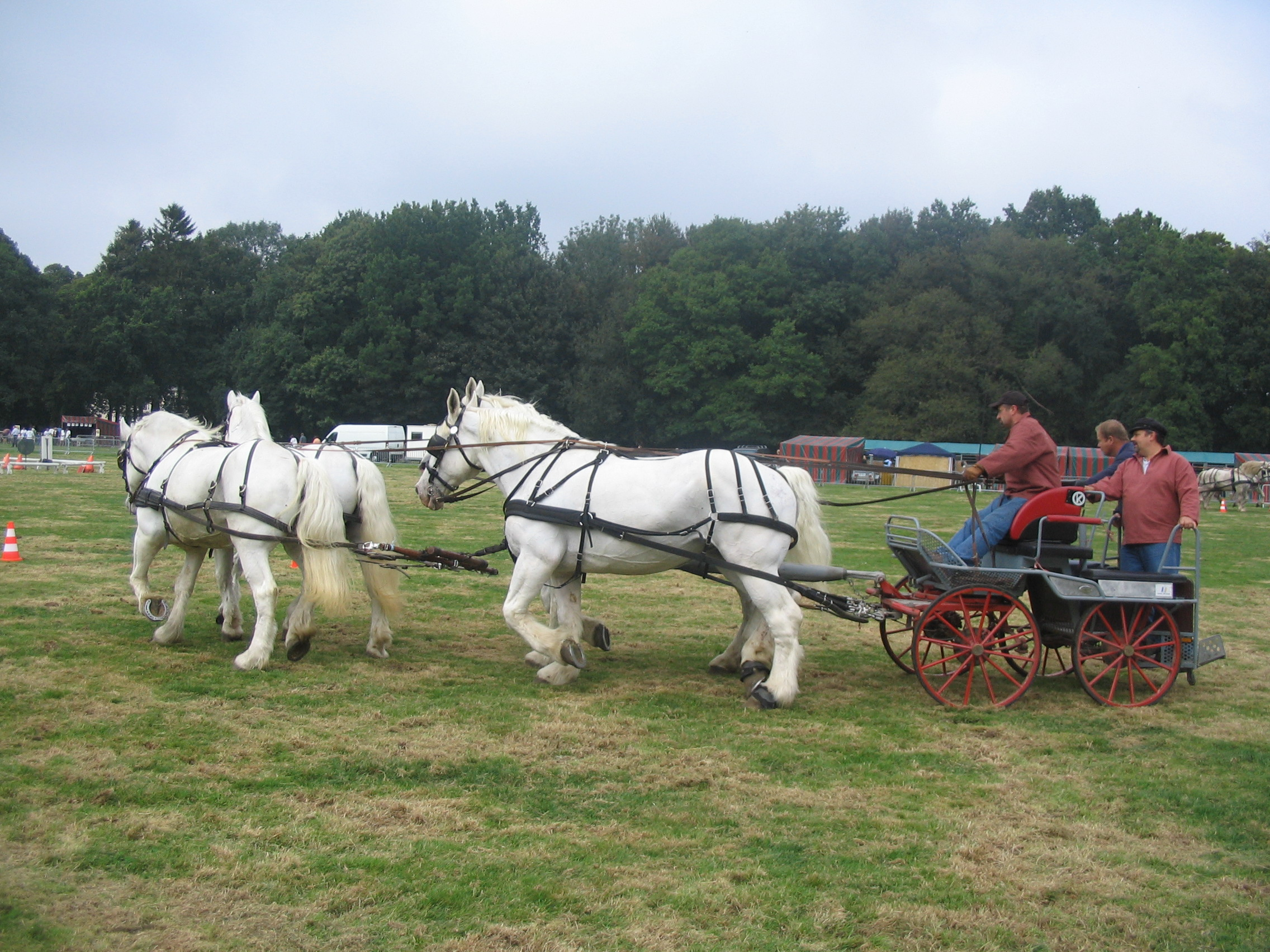 salon de la nature et de la chasse, spécial chevaux 2007